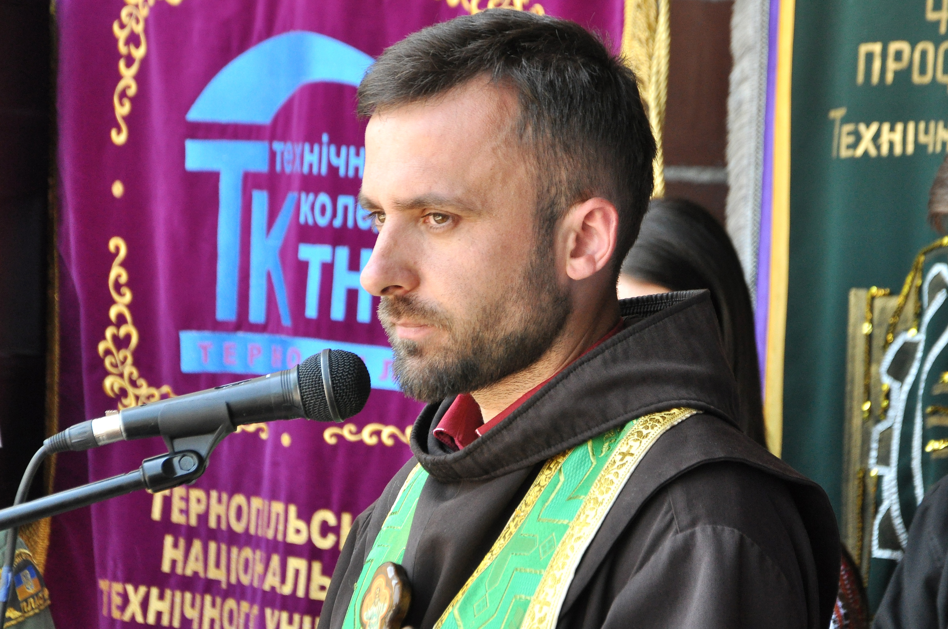 Відкриття пам'ятної дошки Вікторові Гурняку на фасаді Технічного коледжу ТНТУ (на вул. Леся Курбаса) 3 червня 2015 року. Ігумен монастиря Різдва Пресвятої Богородиці в Тернополі, місіонар, асистент ІІІ Чину св. Франциска, редактор газети Вісник Св. Франциска отець Юстиніан Городечний.